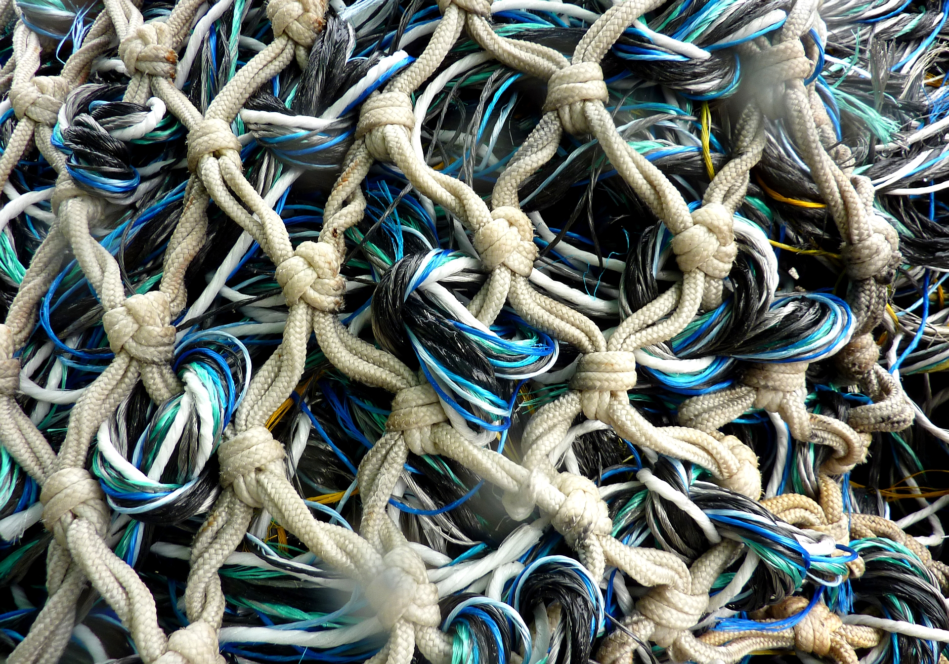 Fischernetz auf einem Ausrüstungskai in Cuxhaven liegend.